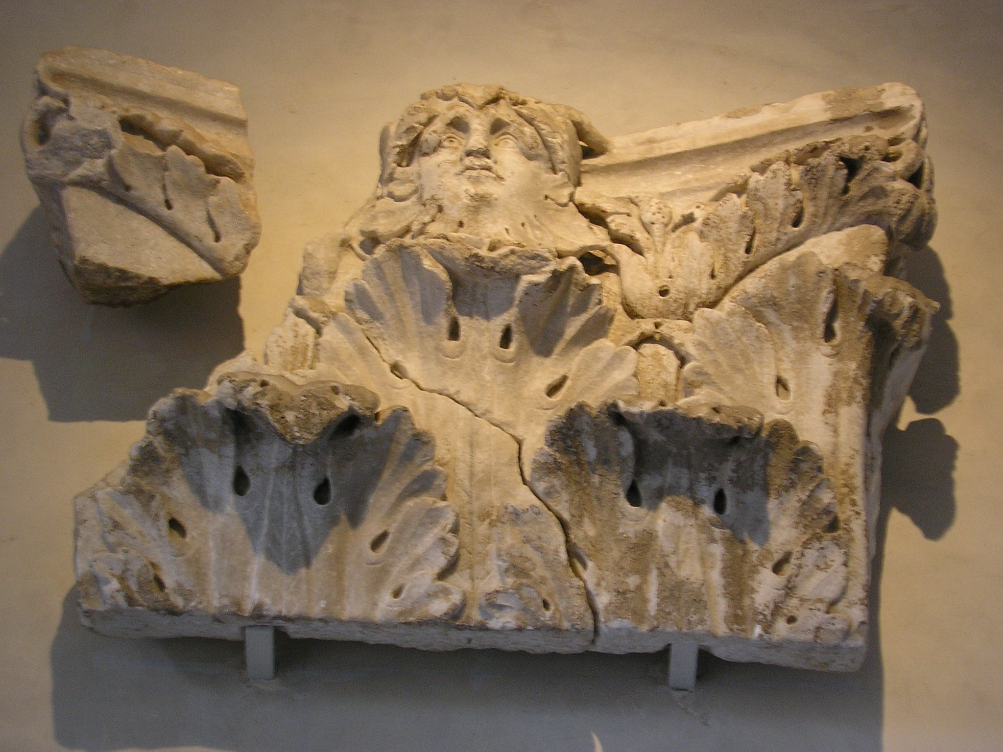 Chapiteau